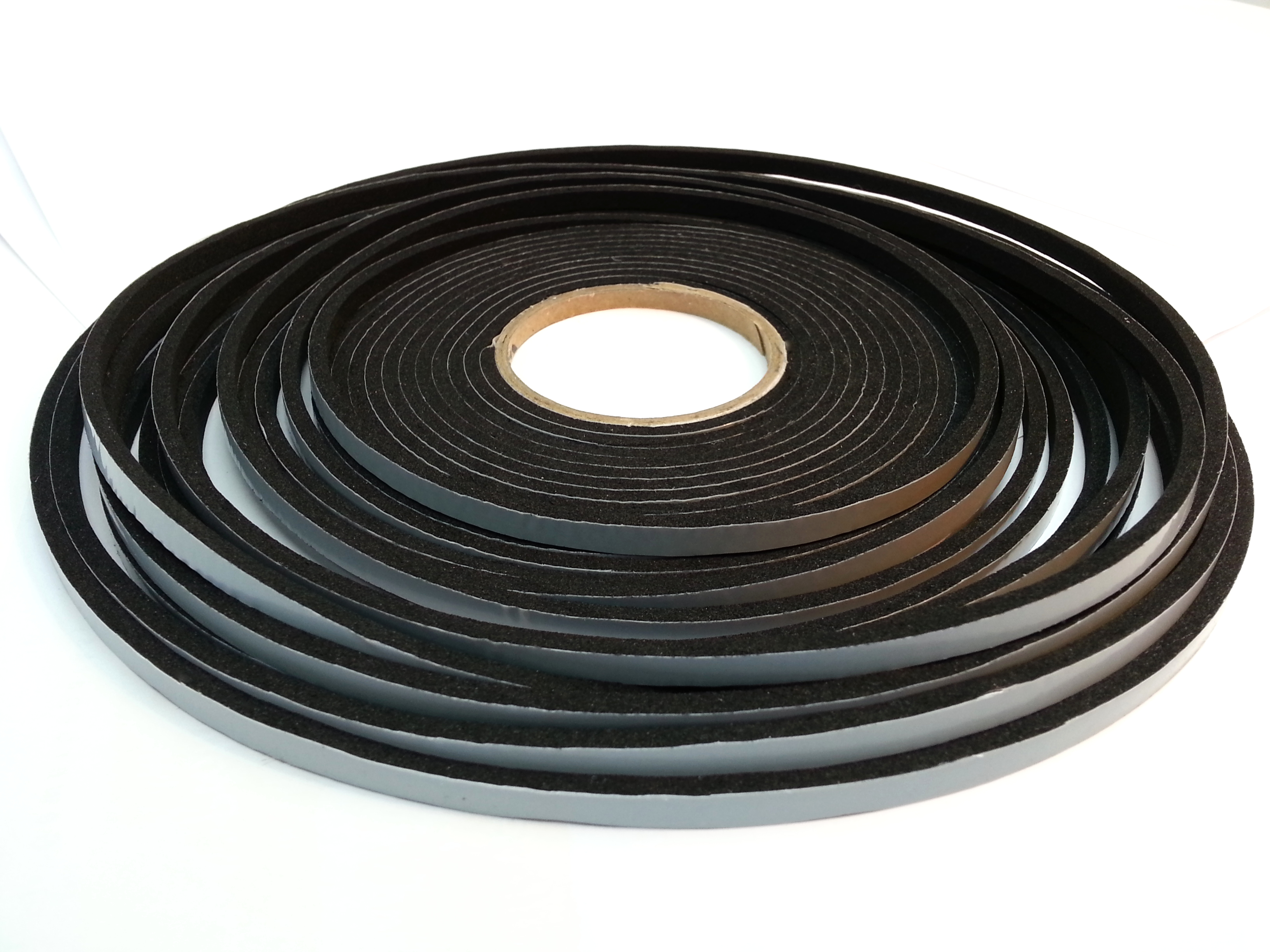 Selbstklebende EPDM-Flachdichtung der Firma COOP! GmbH